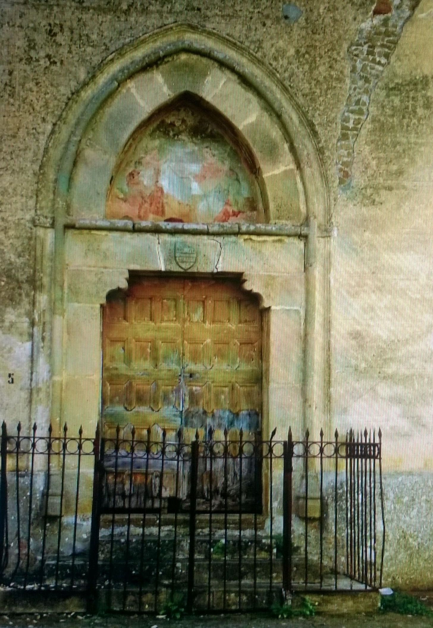 Eretta a devozione in occasione della peste nera , con Bolla del 1348 concessa dal Vescovo Tommaso Santomango ; era di juspatronato dei del Mercato cioè era loro diritto nominare il Rettore e gli altri sacerdoti ; dotata di notevoli beni e rendite; portale trecentesco a ogiva gotica reggeva un avancorpo a baldacchino , intorno a quadrato sul perimetro dello spiazzo c' erano dei sedili di pietra.